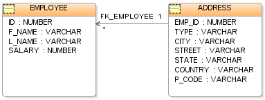 UML data model